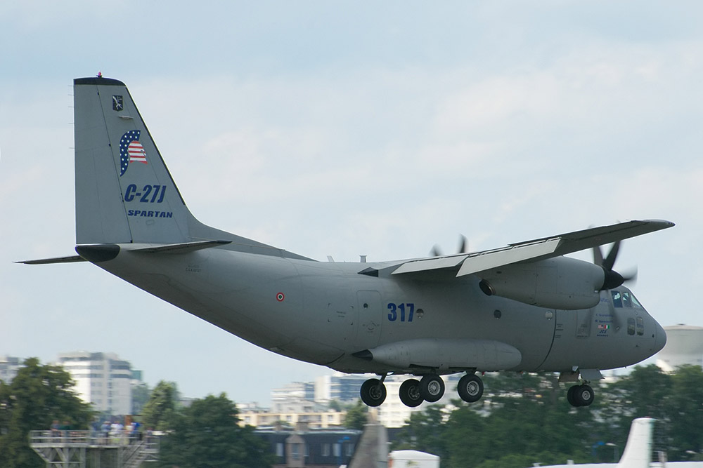 Alenia C27J Spartan